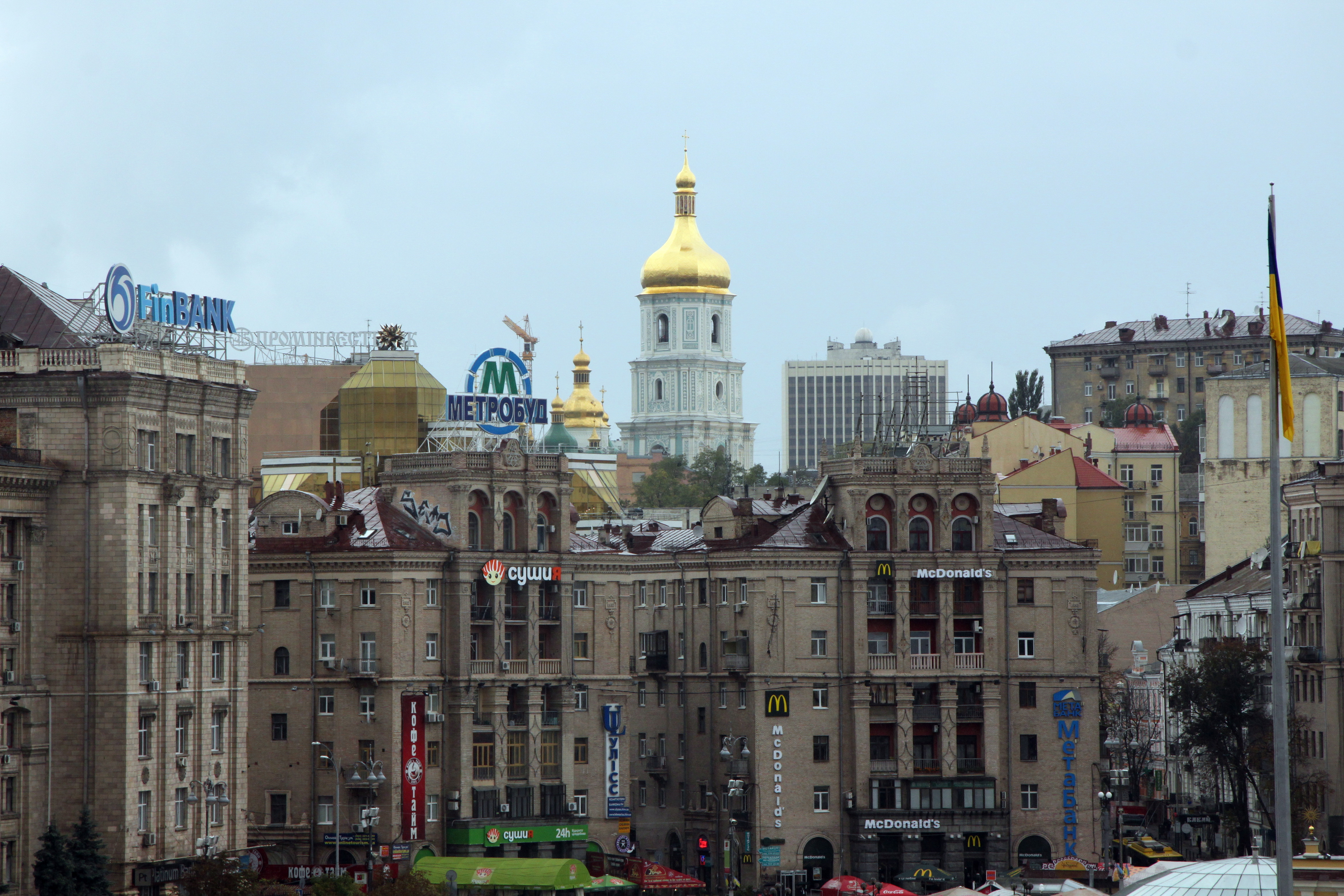 Дзвіниця, Київ, Володимирська вул., 24